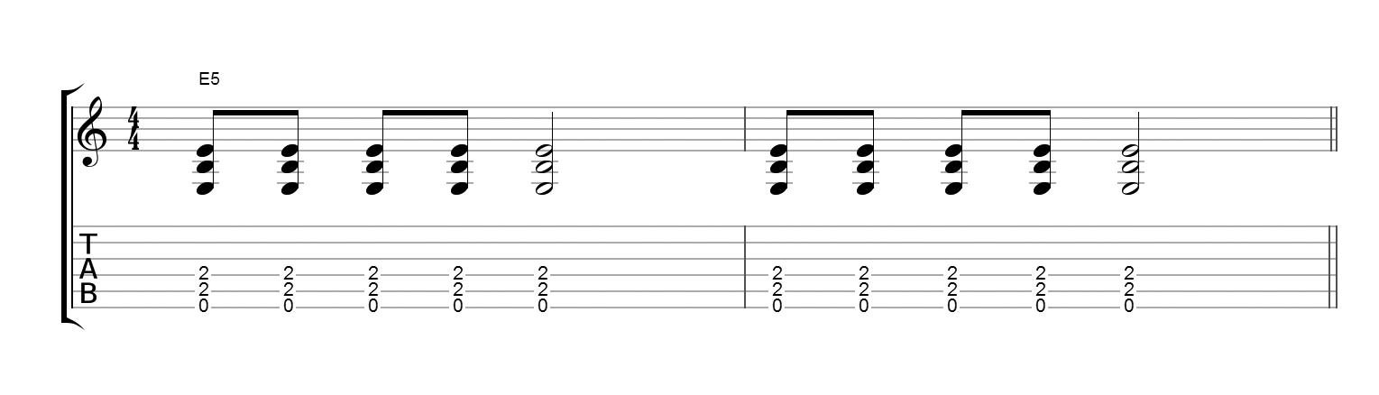 Пример использования квинтаккорда Ми (E5)